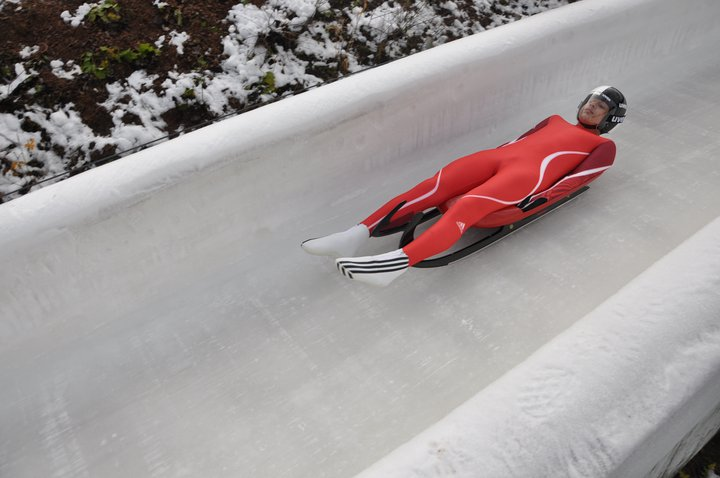 Türk kızak sporcusu